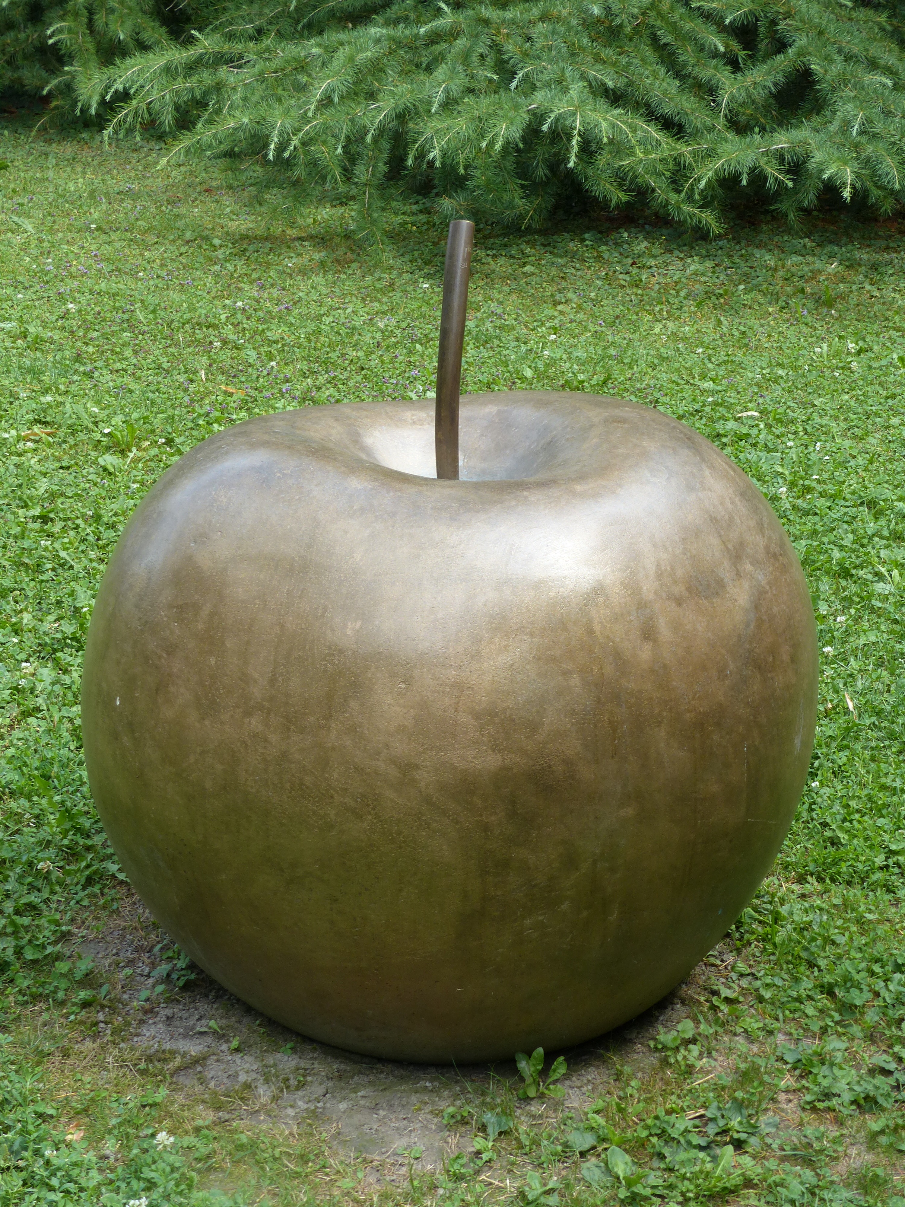 Claude Lalanne, La Pomme de Guillaume Tell (2004). Im Park der Fondation Gianadda, Martigny